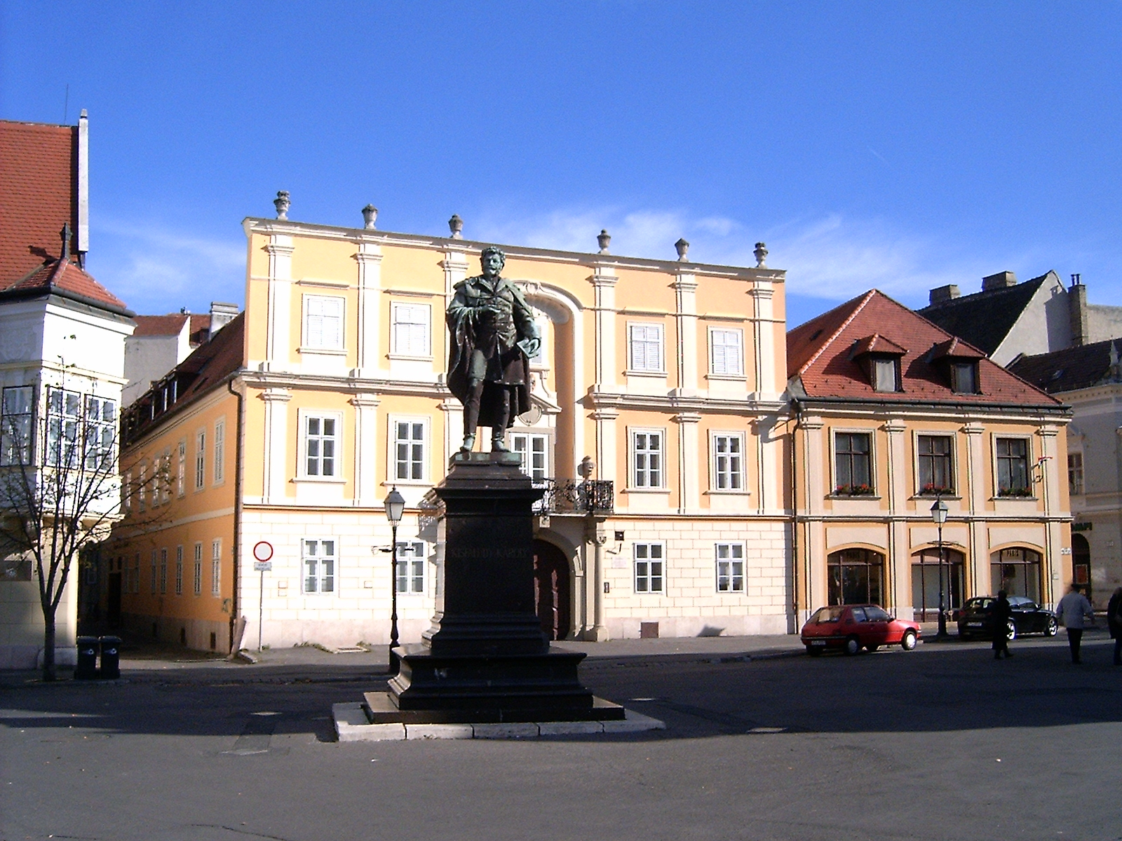 A Bécsi kapu tér közepén Kisfaludy Károly bronzszobrával. A szobor Mátrai Lajos György alkotása, 1892-ben a sétatéri szigeten állították, 1921-ben helyezték át jelenlegi helyére. (saját kép)